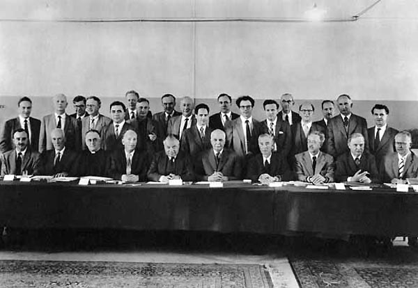 Sentados, de izquierda a derecha : McCrea, Oort, Lemaitre, Gorter, Pauli, Bragg, Oppenheimer, Moller, Shapley, Heckmann. De pie, de izquierda a derecha : Klein, Morgan, Hoyle, Kukaskin, Ambarzumian, van de Hulst, Fierz, Sandage, Baade, Schatzman, Wheeler, Bondi, Gold, Zanstra, Rosenfeld, Ledoux, Lovell, Geneniau